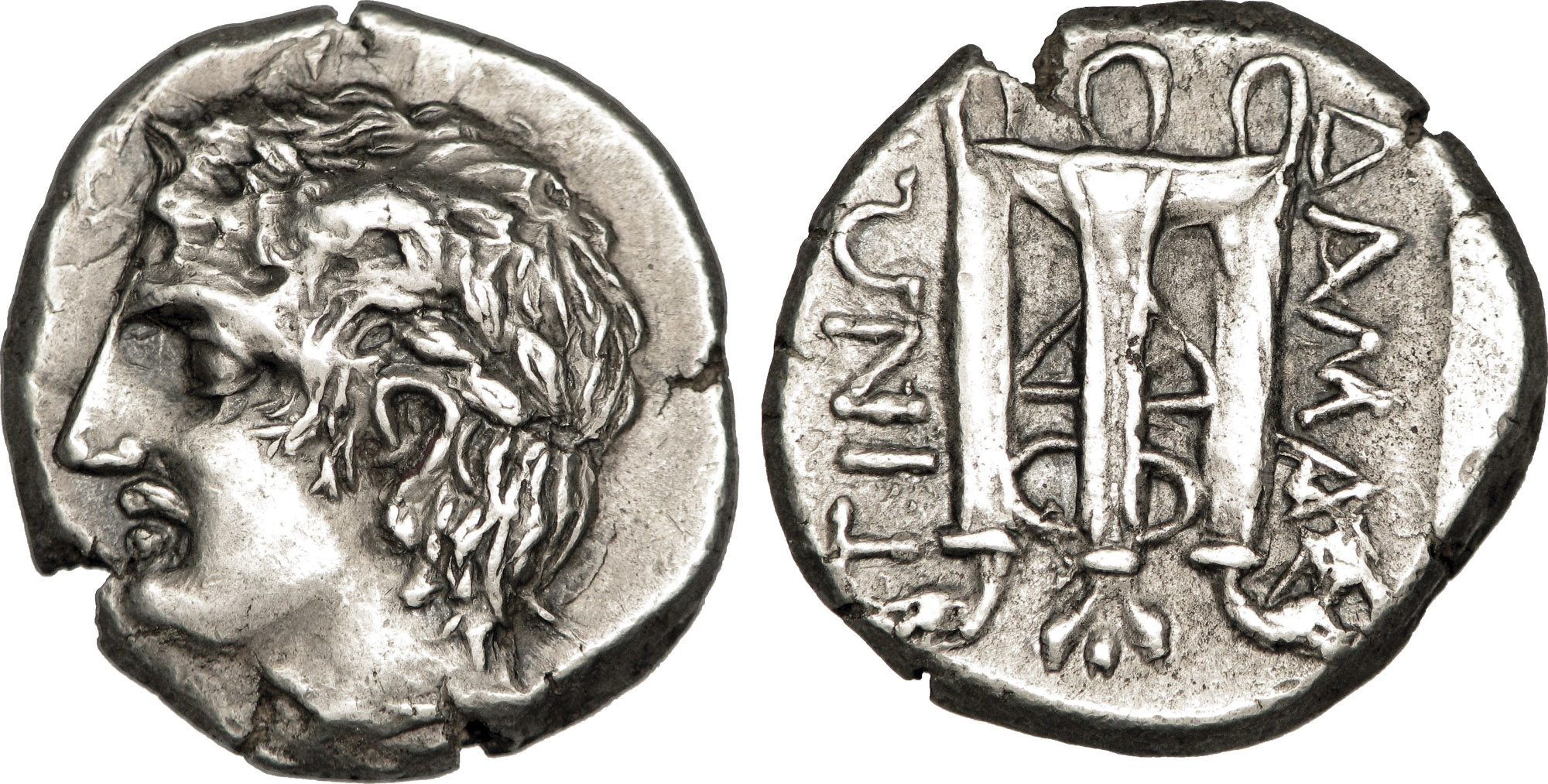 Nom de l'atelier : Illyrie, Damastion Métal : argent Diamètre : 23,00mm Axe des coins : 5h. Poids : 13,59g. Titulature avers : Anépigraphe. Description avers : Tête laurée d’Apollon à gauche, les cheveux mi-longs tombant en mèches sur la nuque. Description revers : Trépied delphien surmonté du lébès avec ses anneaux dans les restes d’un carré creux. Légende revers : DAMAS//TINW.. Traduction revers : (de Damastion).